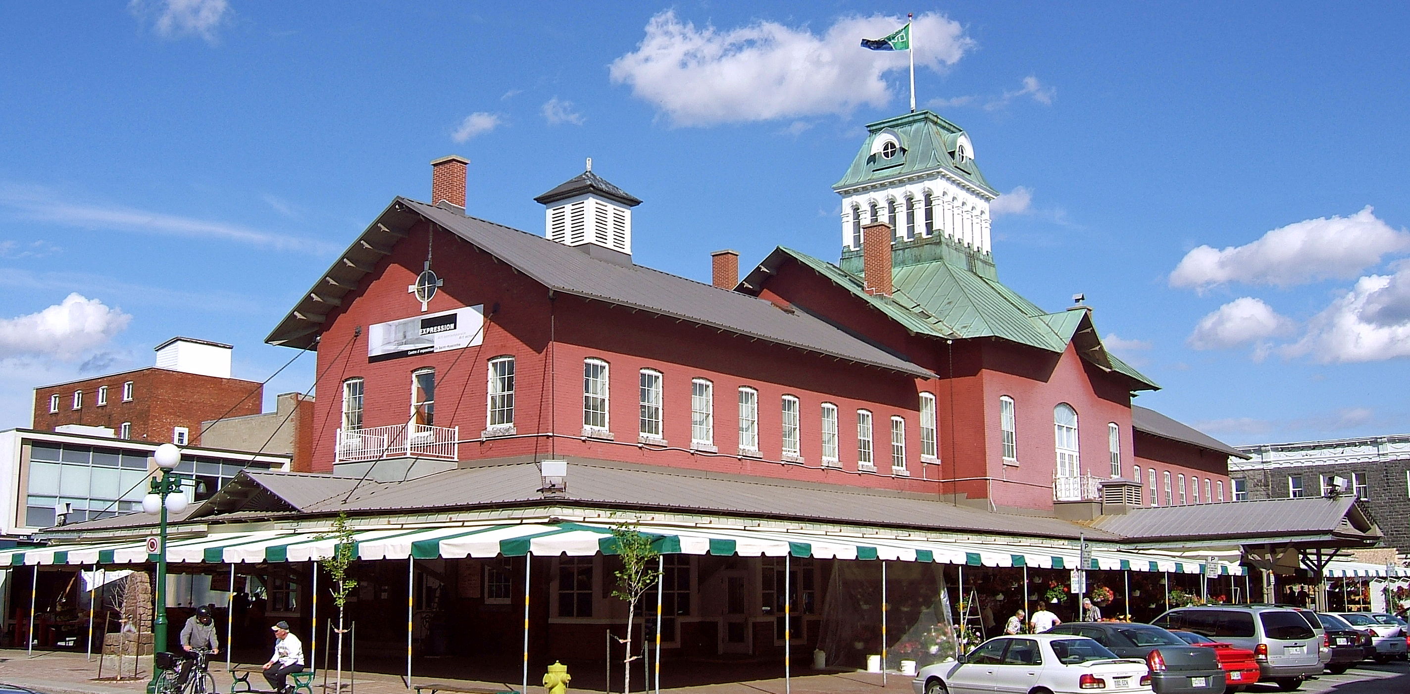 Marché-Centre de Saint-Hyacinthe, construit en 1876. Plus ancien marché public à avoir conservé sa vocation originale. La fontaine, à l'avant, fût un don du Seigneur Robert Jones en 1879.